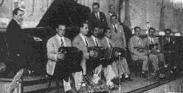 Fotografía de Lucio Demare y su orquesta